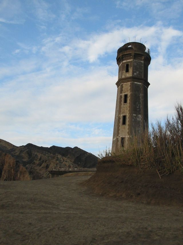 Leuchtturm am Ponta dos Capelinhos Andere Versionen